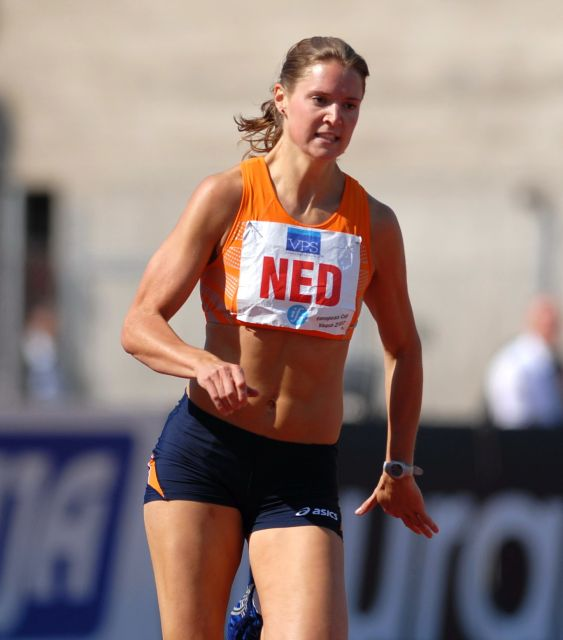 Annemarie Schulte during Europacup 2007